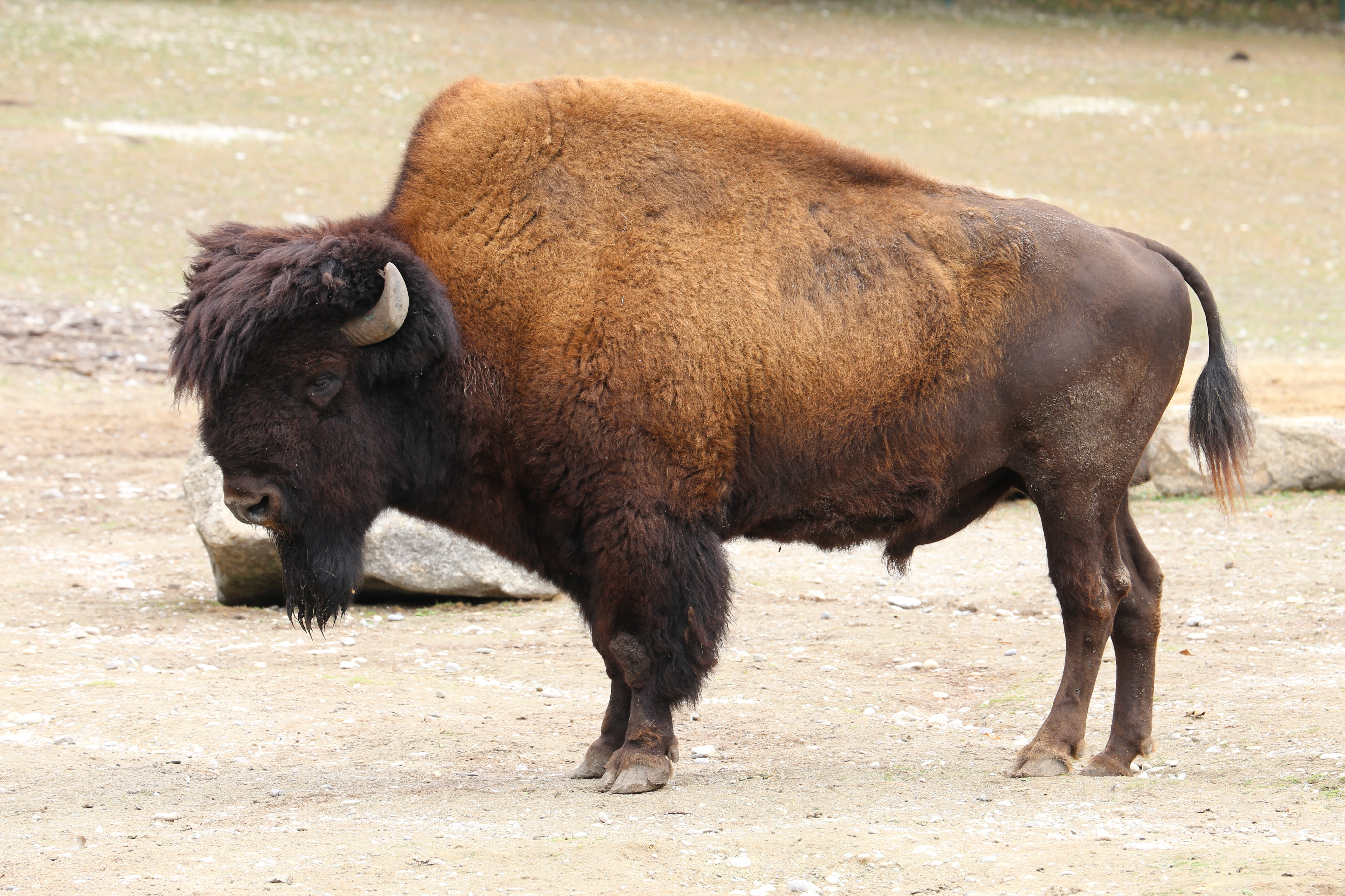 Waldbison (Bison bison athabascae), Tierpark Hellabrunn, München